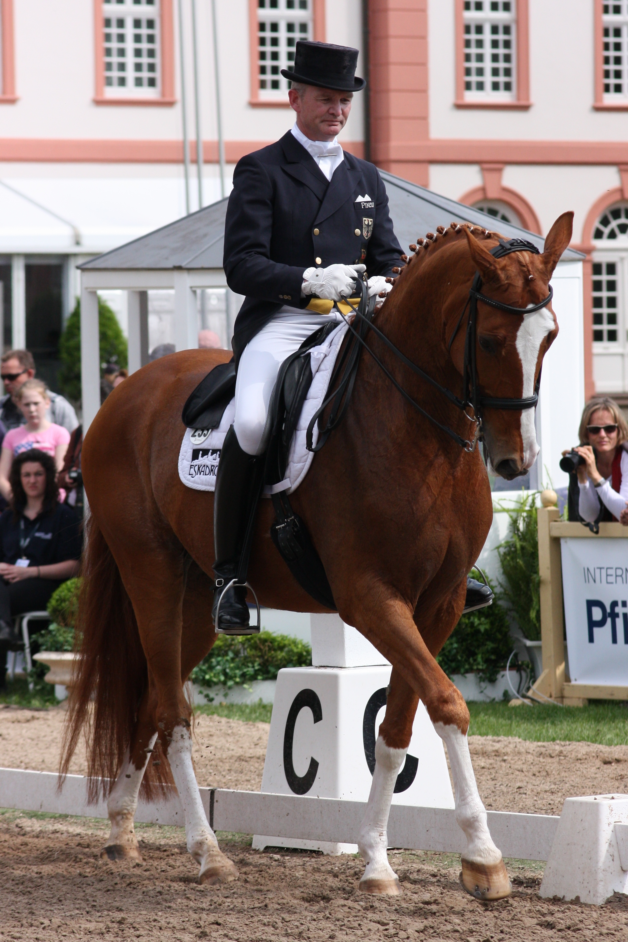 77. Internationales Pfingstturnier Wiesbaden 2013, CDI **** Dressurprüfung Grand Prix de Dressage, Schmidt, Hubertus mit Donnelly Personality rights warningAlthough this work is freely licensed or in the public domain, the person(s) shown may have rights that legally restrict certain re-uses unless those depicted consent to such uses. In these cases, a model release or other evidence of consent could protect you from infringement claims.